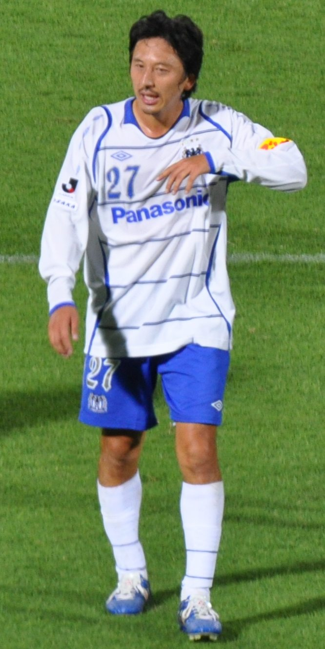 Kawasaki Frontale vs Gamba Osaka_439